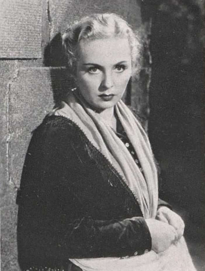 Helena Bušová (1911-1986), česká herečka.